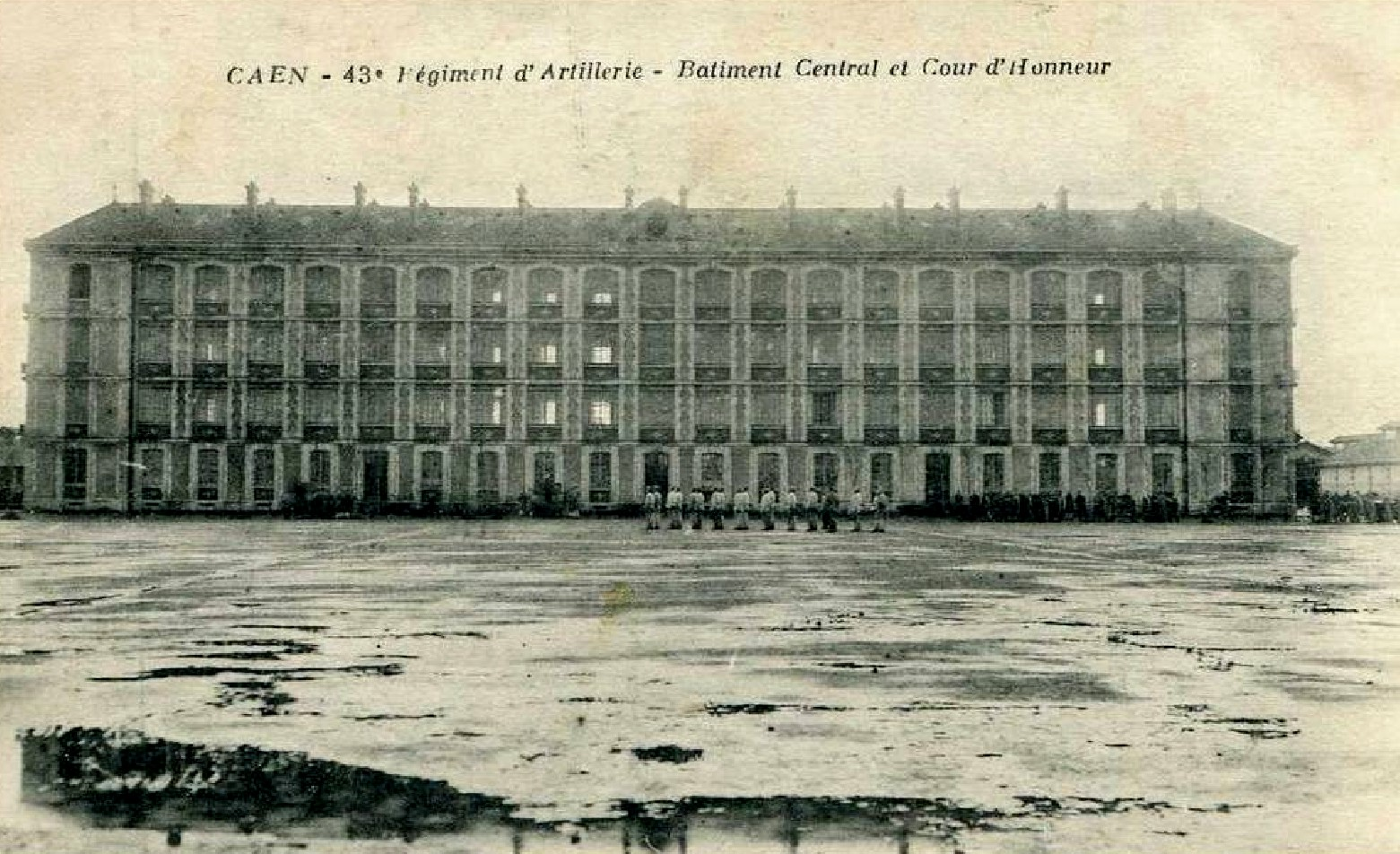 Bâtiment principal et cour d'honneur du quartier d'artillerie Claude Decaen à Caen